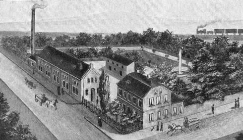 Die Bettfedern- und Daunenfabrik Werner & Ehlers, hier noch in den Anfängen an der Kirchwender Straße in Hannover ...